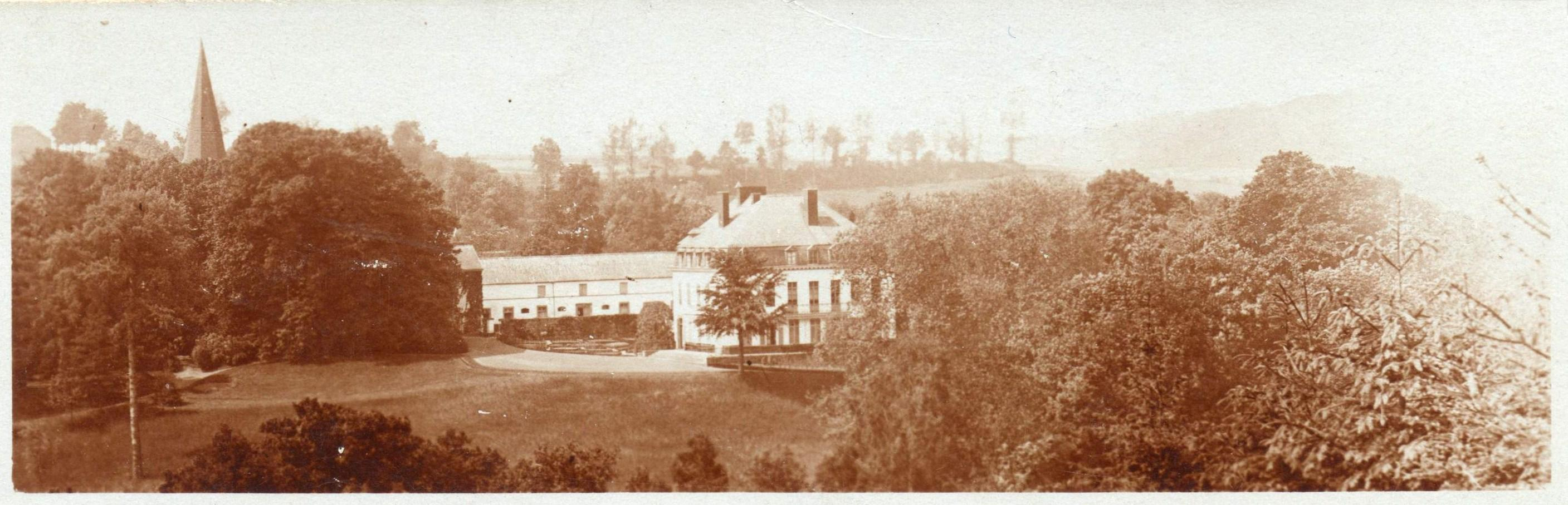 Vue sur le château d'Auxy dit Goblet d'Alviella à Court St Etienne. depuis le N-E (côté rue du Tienne) de gauche à droite : le clocher de l'église Saint Etienne, les dépendances, le corps d'habitation. Au fond : le relief de la rue Sambrée. Photographié vers 1915.